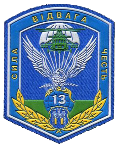 Нарукавний знак 13-го батальйону 95-ї окремої аеромобільної бригади